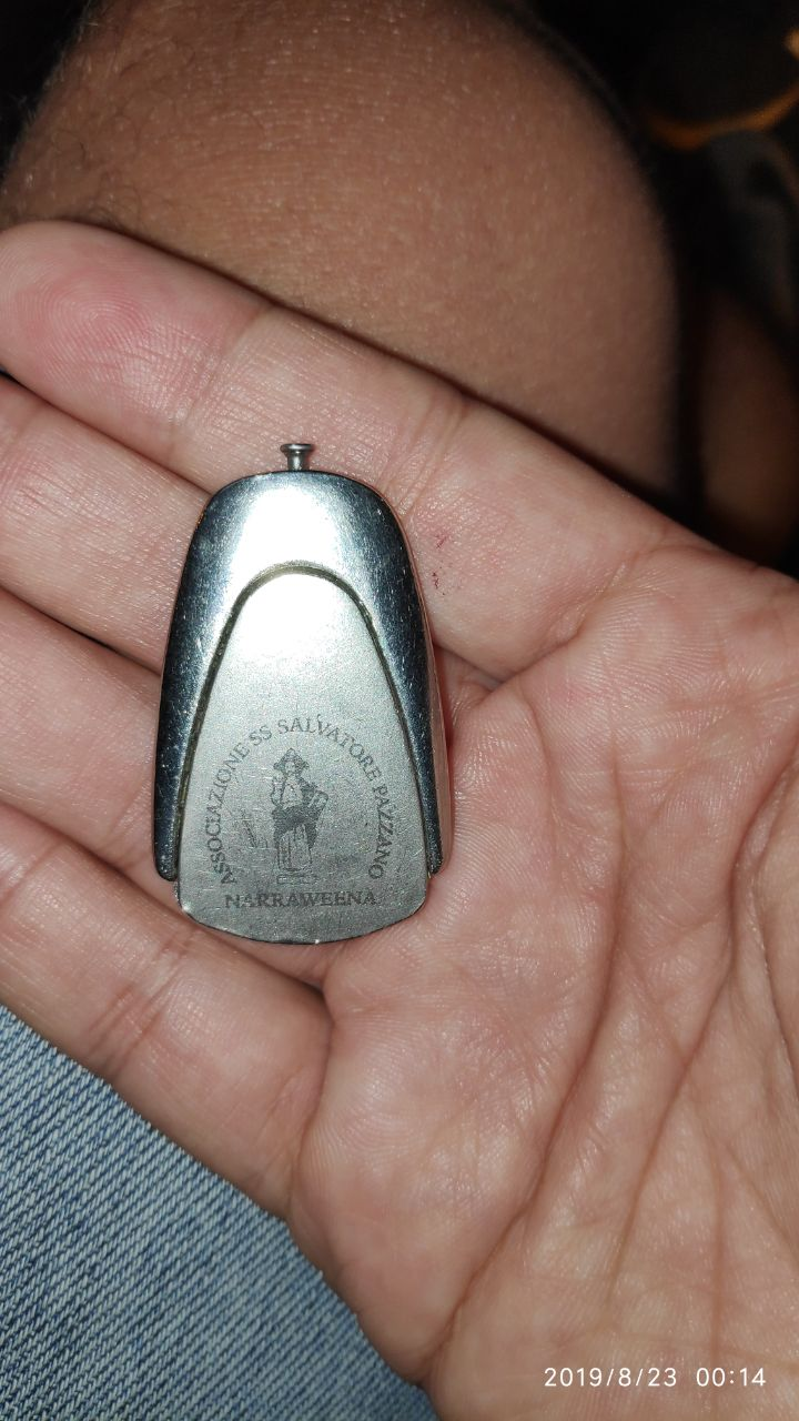 Ricordo dell'Associazione Santo Salvatore Narraweena (Australia) (2019)